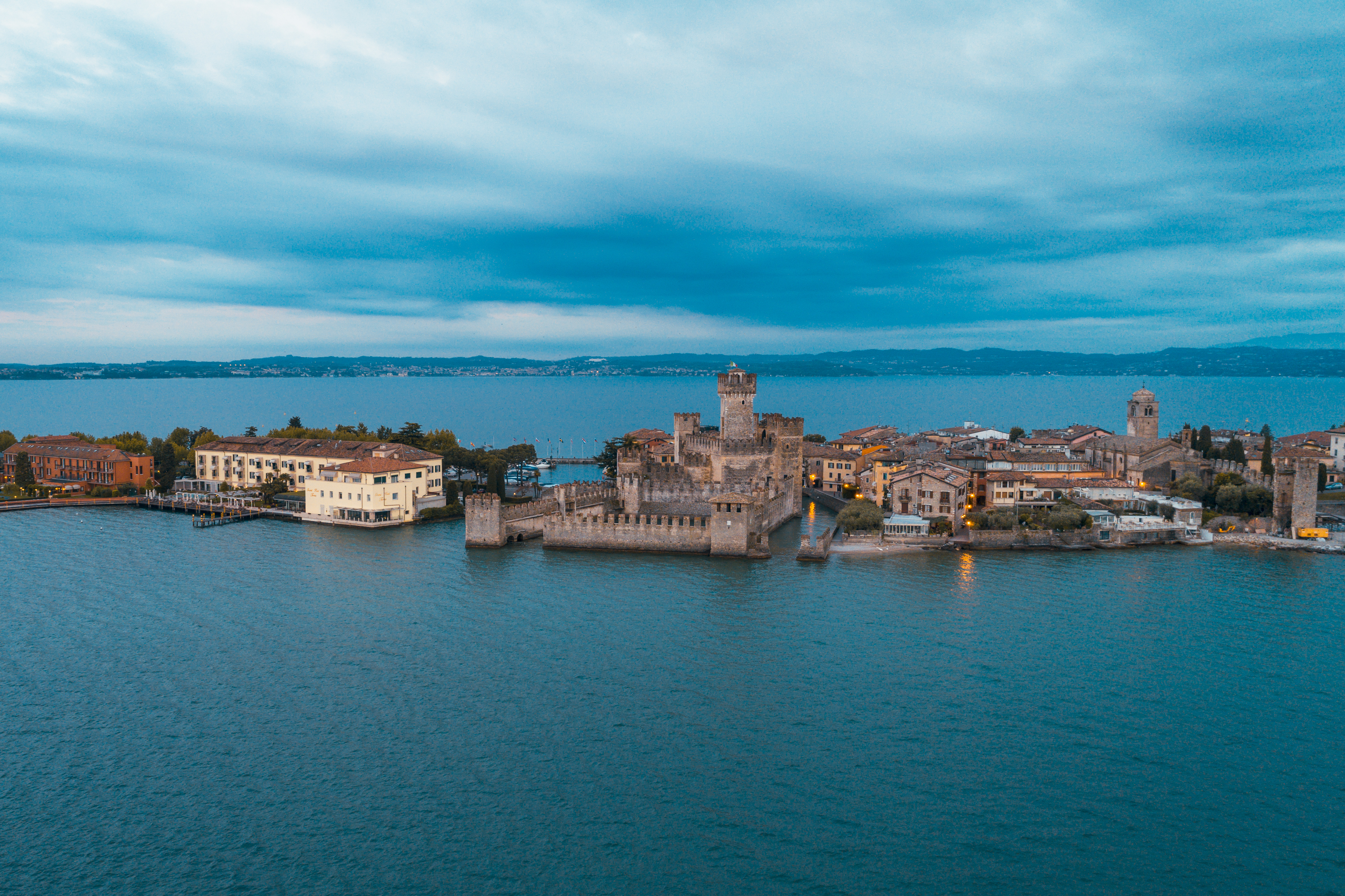 Veduta aerea del Castello Scaligero di Sirmione all'alba. This is a photo of a monument which is part of cultural heritage of Italy.